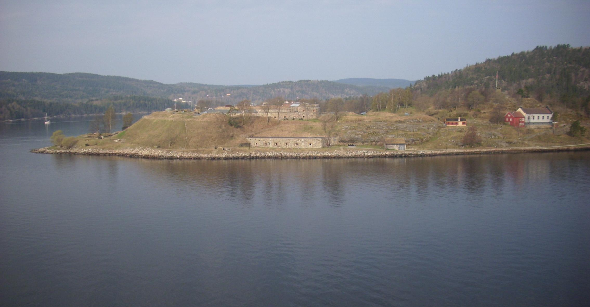 Festung Oscarsborg im Oslofjord